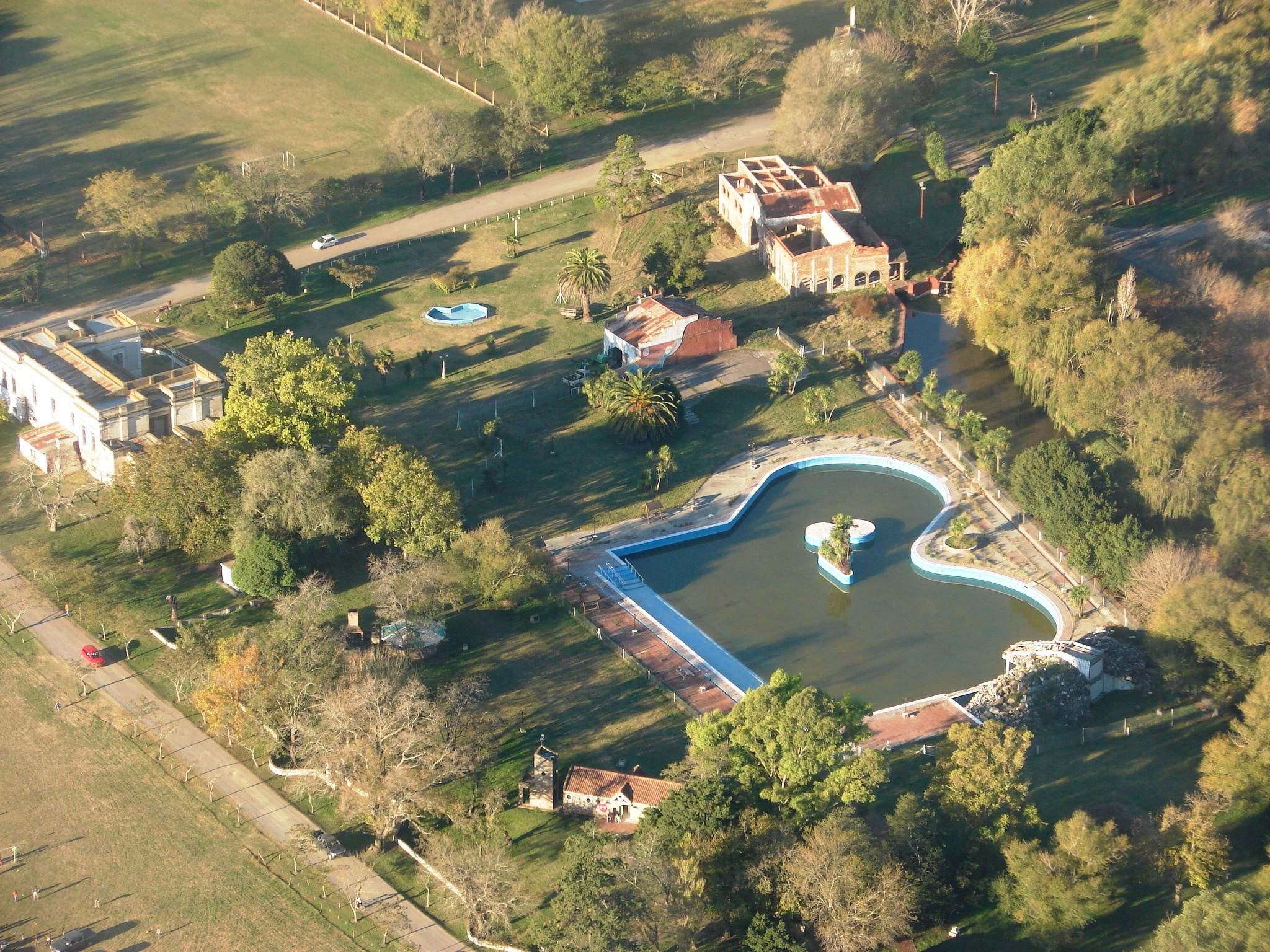 Foto